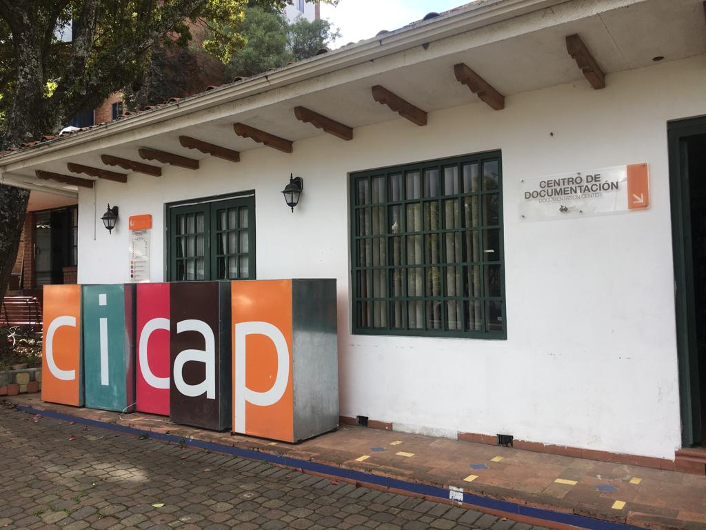 Esta es una pequeña biblioteca que se encuentra en la plata baja del CIDAP, esta dedicada a recopilar toda la información sobre Artesanías y Artes Populares de Latinoamérica.